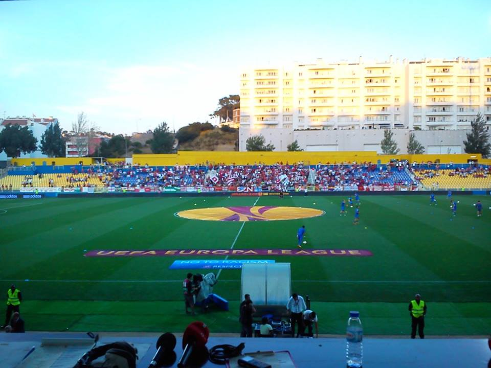 Partido de Europa League disputado entre el Estoril y el Sevilla FC